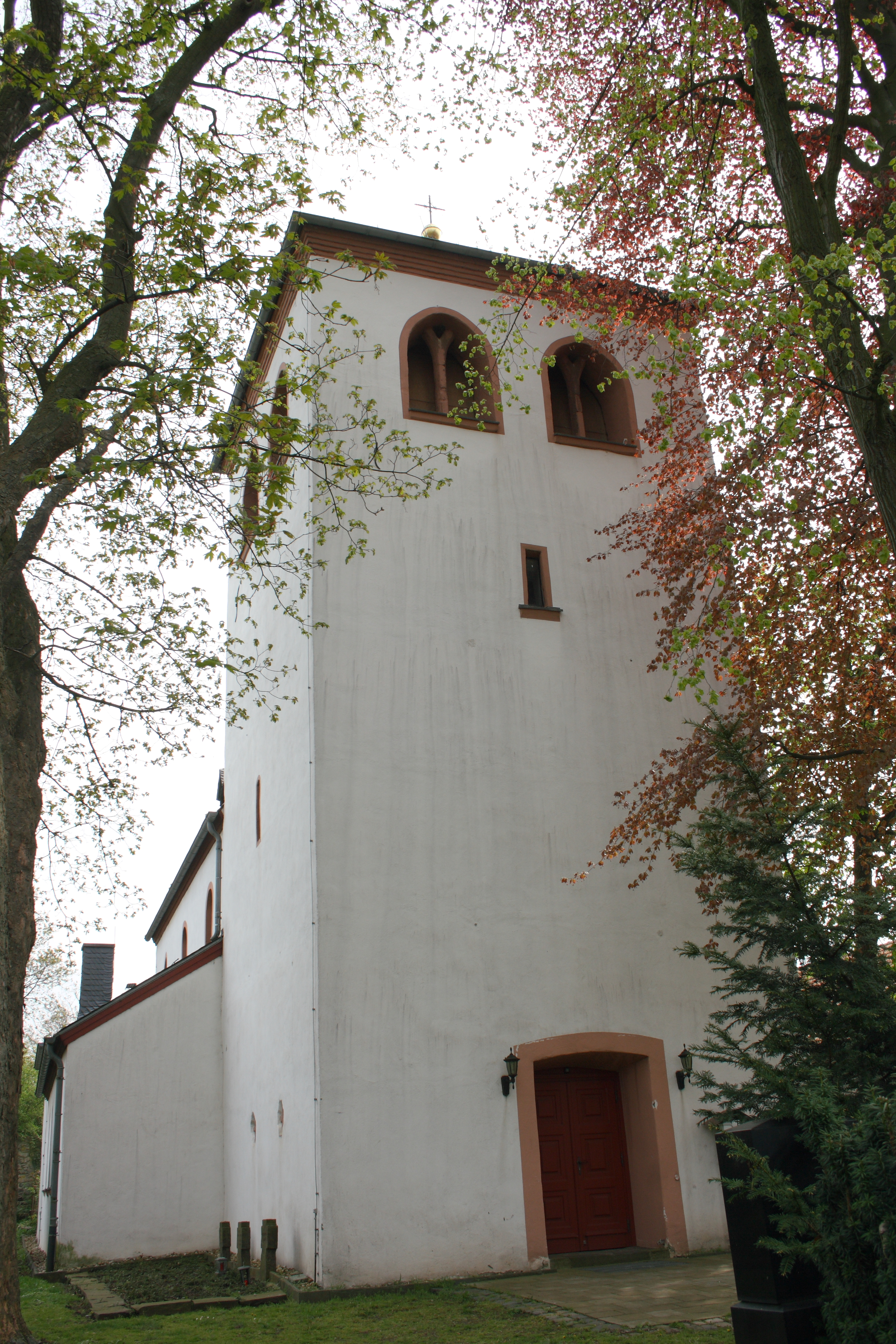 alte Pfarrkirche St. Peter und Paul in Kleinbüllesheim, heute orthodoxe Gemeinde Johannes der Täufer